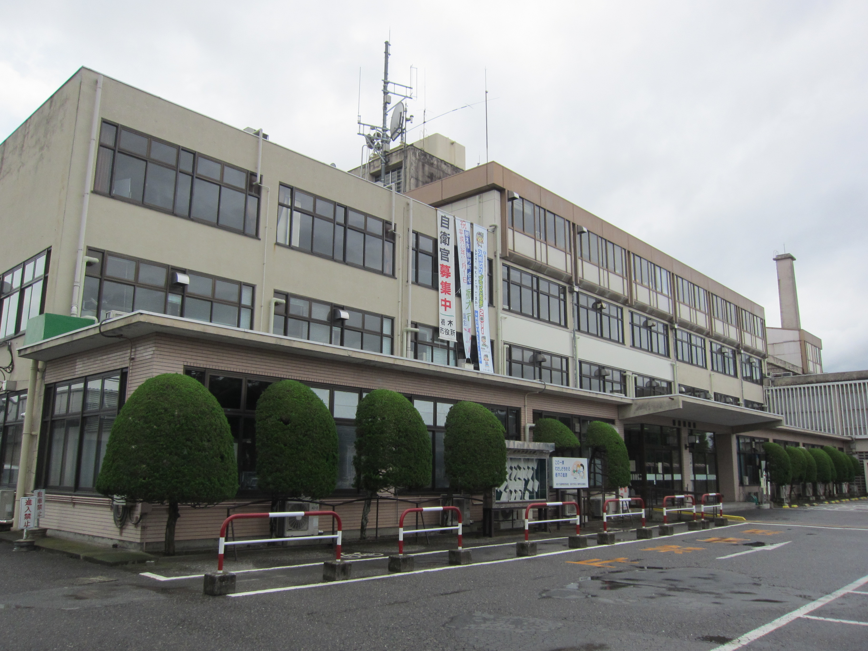 栃木市役所庁舎